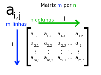 Ilustração básica da organização geral de uma matriz no sentido matemático.